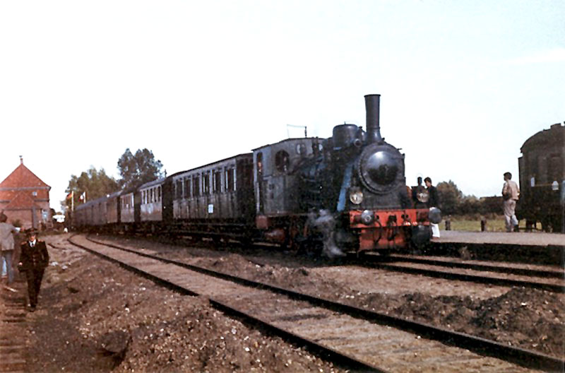 VVM-Zug mit einer 1920 gebauen Dampflok „Thüringen“, Fabrik-Nr. 18038, der Henschel-Werke in den 70er Jahren in Schönberger Strand.